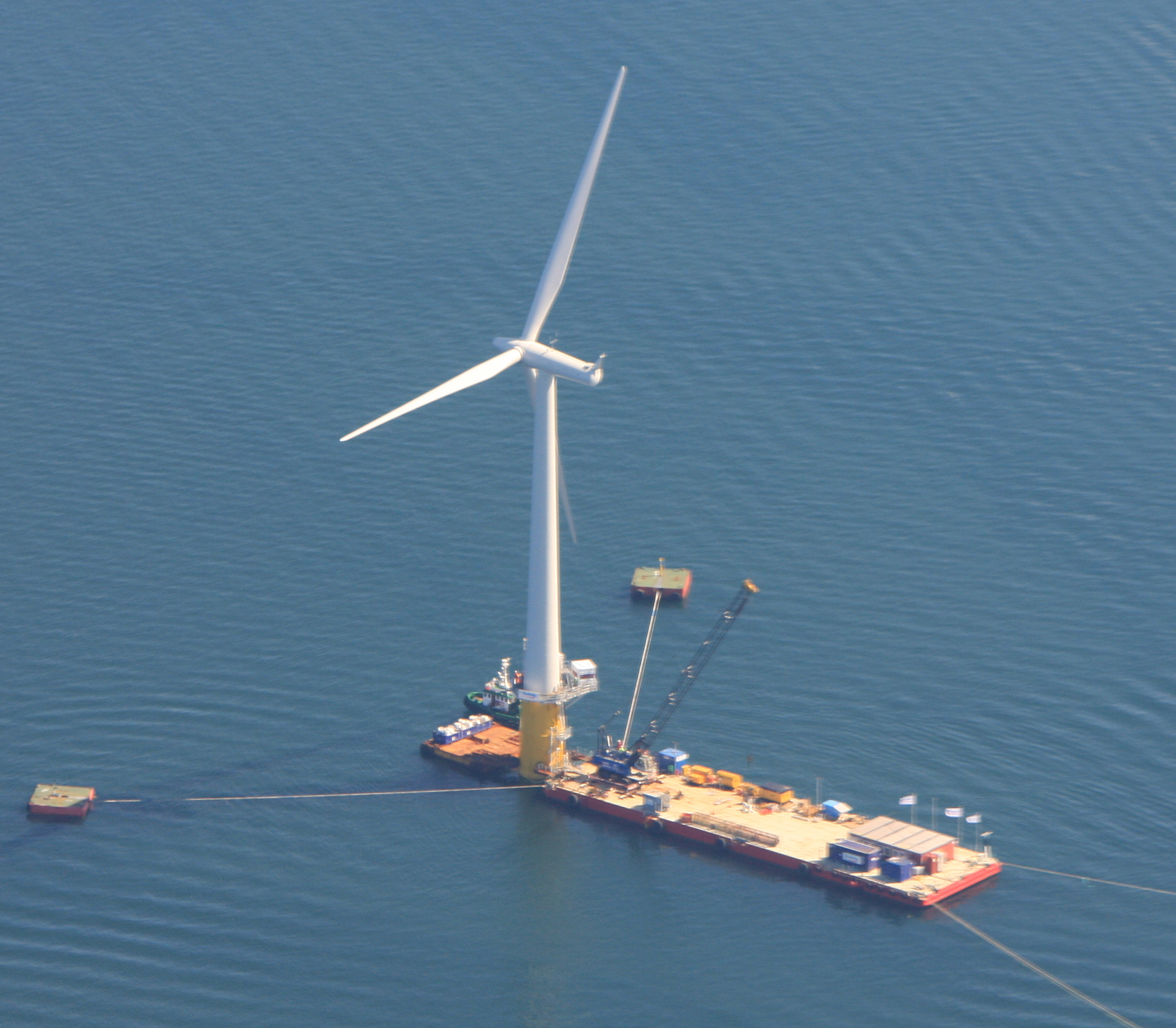 Hywind havvindmølle, verdens første flytende havvindmølle